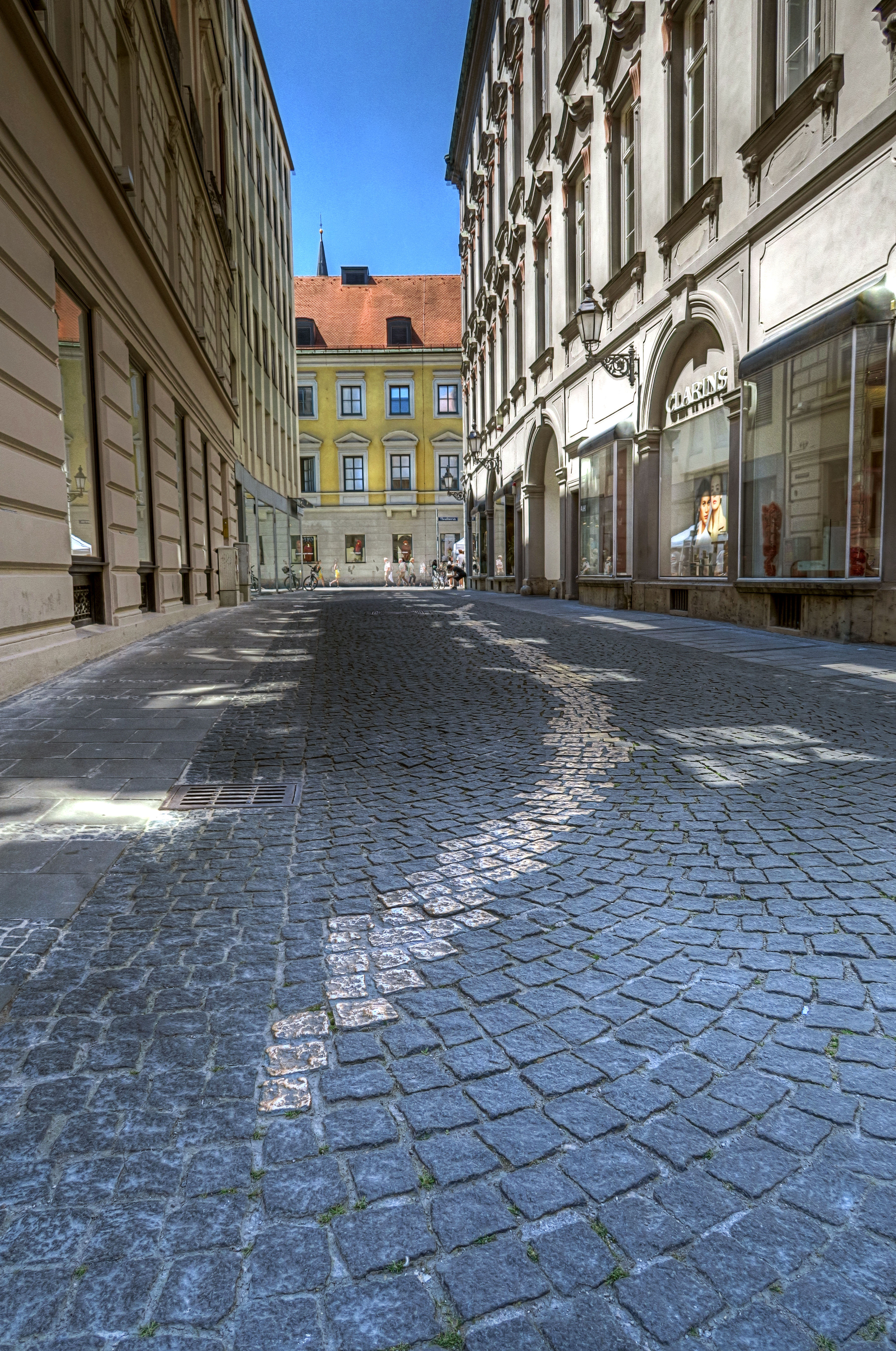 Deutschland, Bayern, Oberbayern, MÜnchen, Altstadt, Viscardigasse auch Drückebergergasse, Bodendenkmal